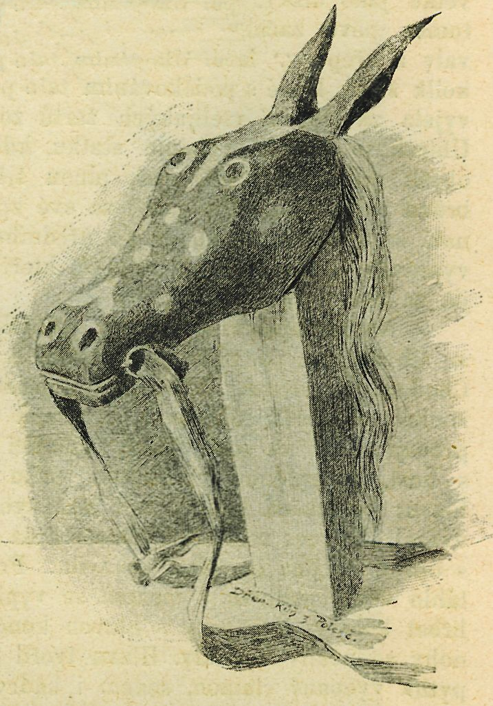 Деревянная маска коня